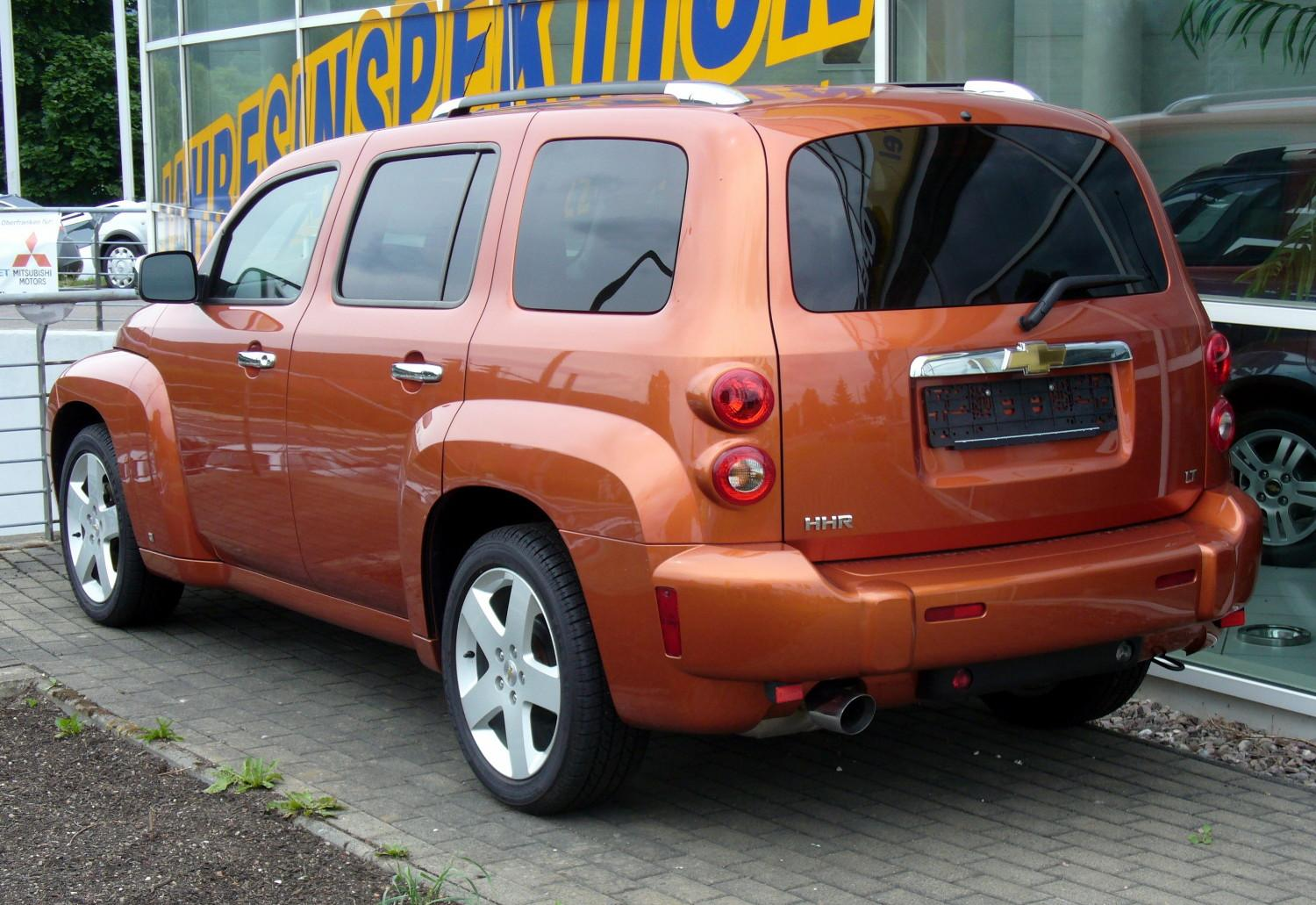 Chevrolet HHR